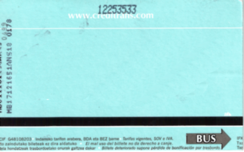 Creditrans por la cara "bus"